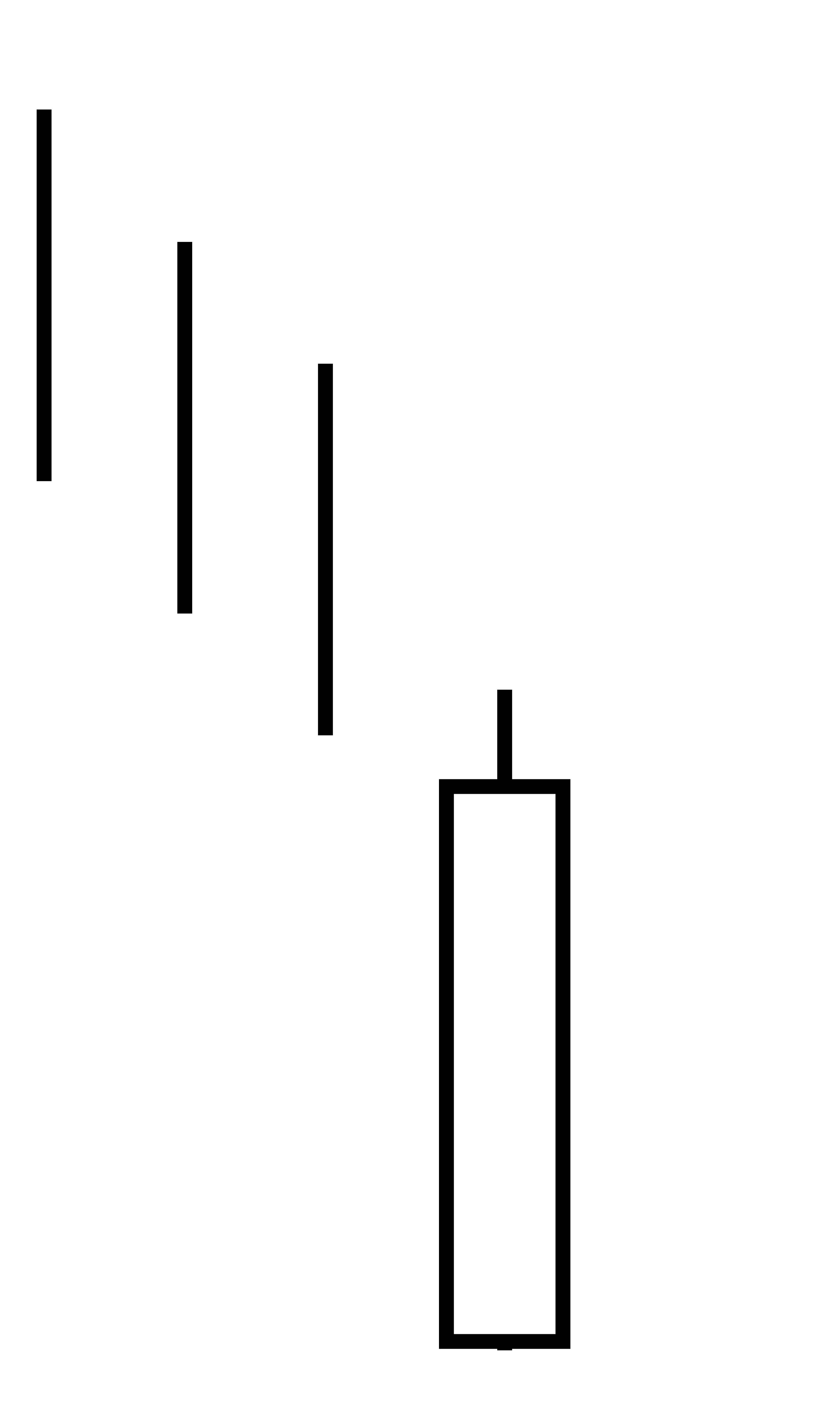 Bullish Belt Hold